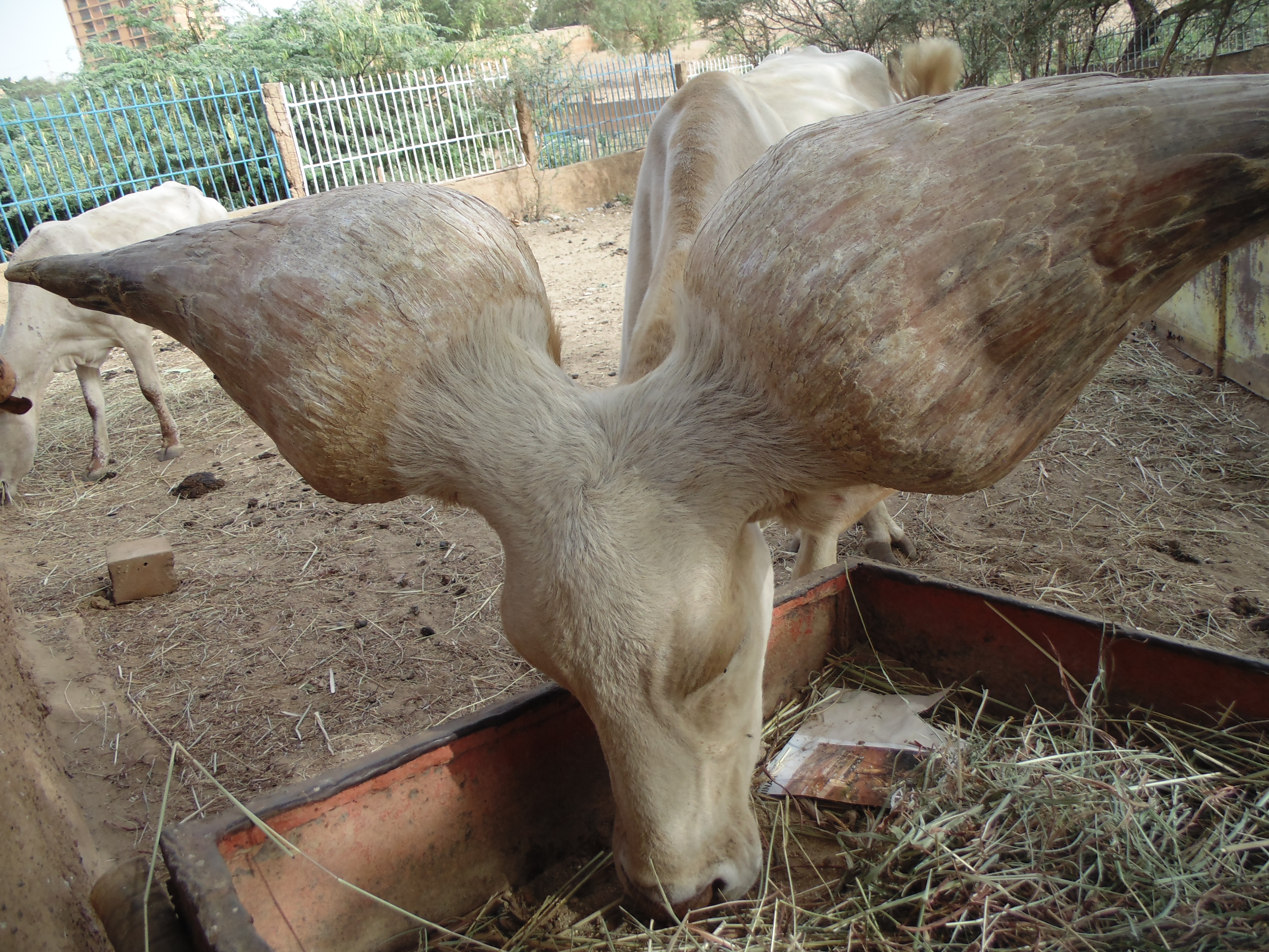 Wikichallenge 2019